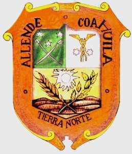 escudo de allende coahuila